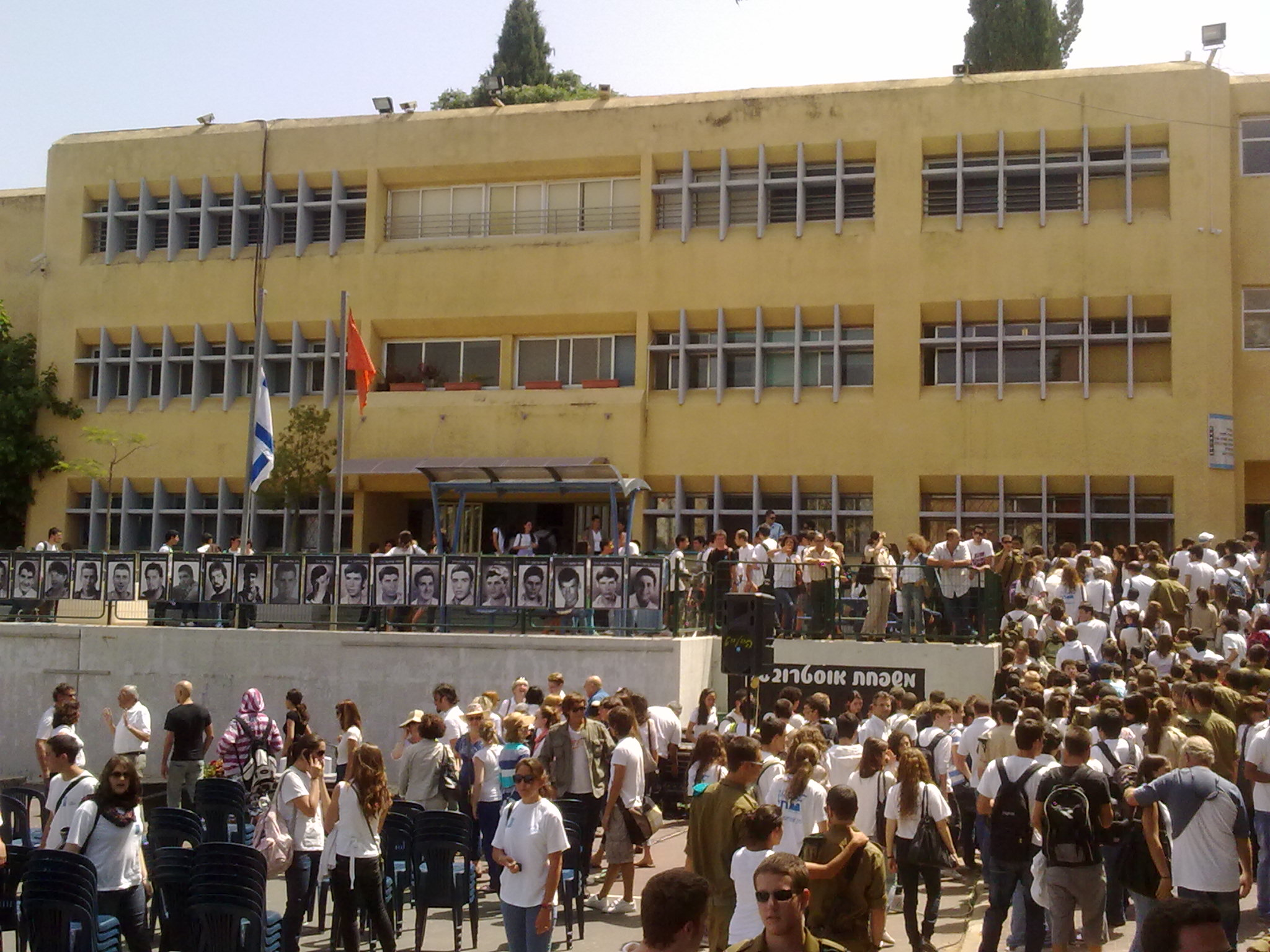 סיומו של טקס יום הזיכרון בhe:תיכון אוסטרובסקי